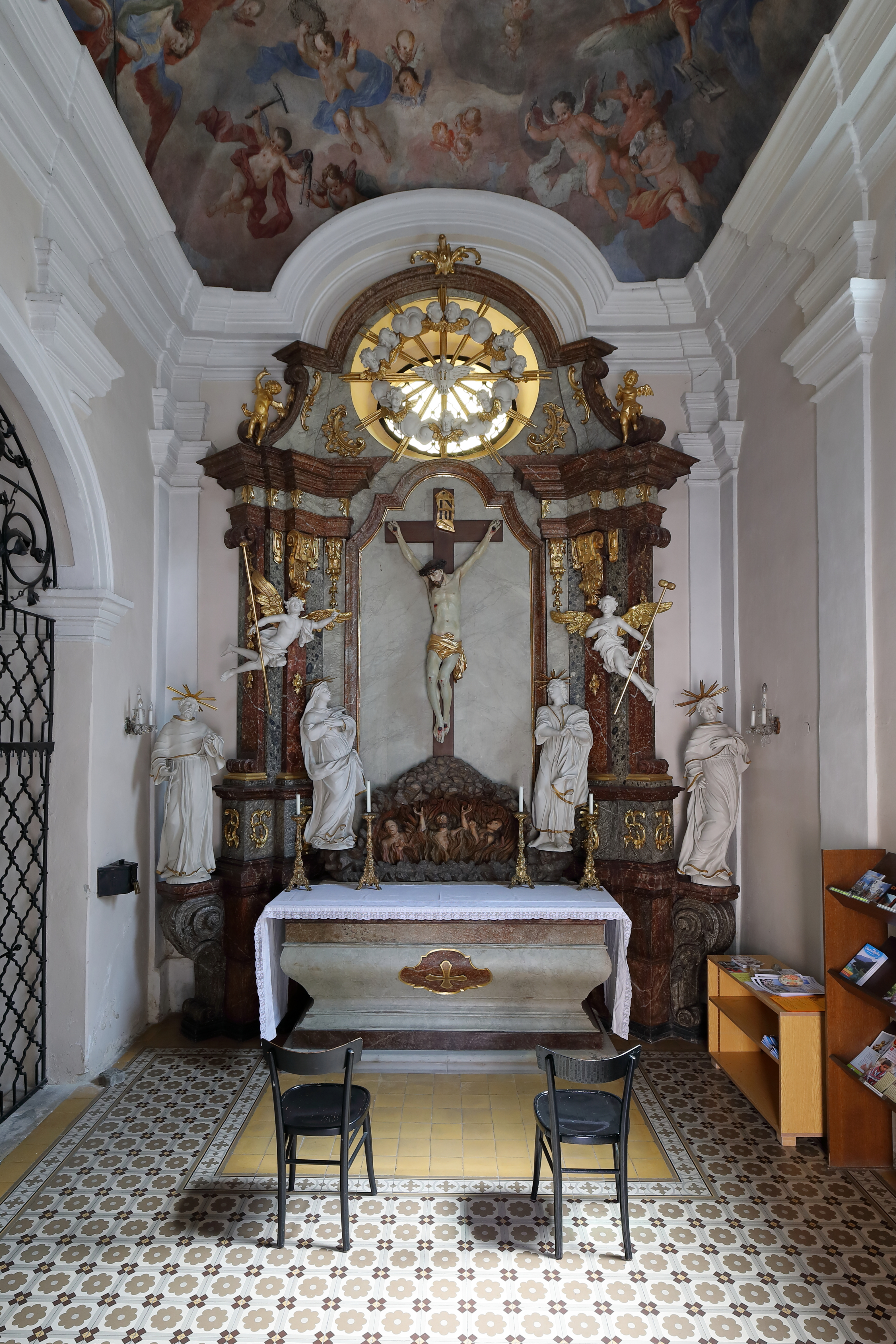 Altar der Arme-Seelen-Kapelle in der niederösterreichischen Stadtgemeinde Neunkirchen.Die Kapelle ist eine Stiftung des Neunkirchner Ratsherrn Sebastian Eder aus dem Jahr 1733 und wurde an das südliche Seitenschiff der röm.-kath. Pfarrkirche Mariae Himmelfahrt angebaut.